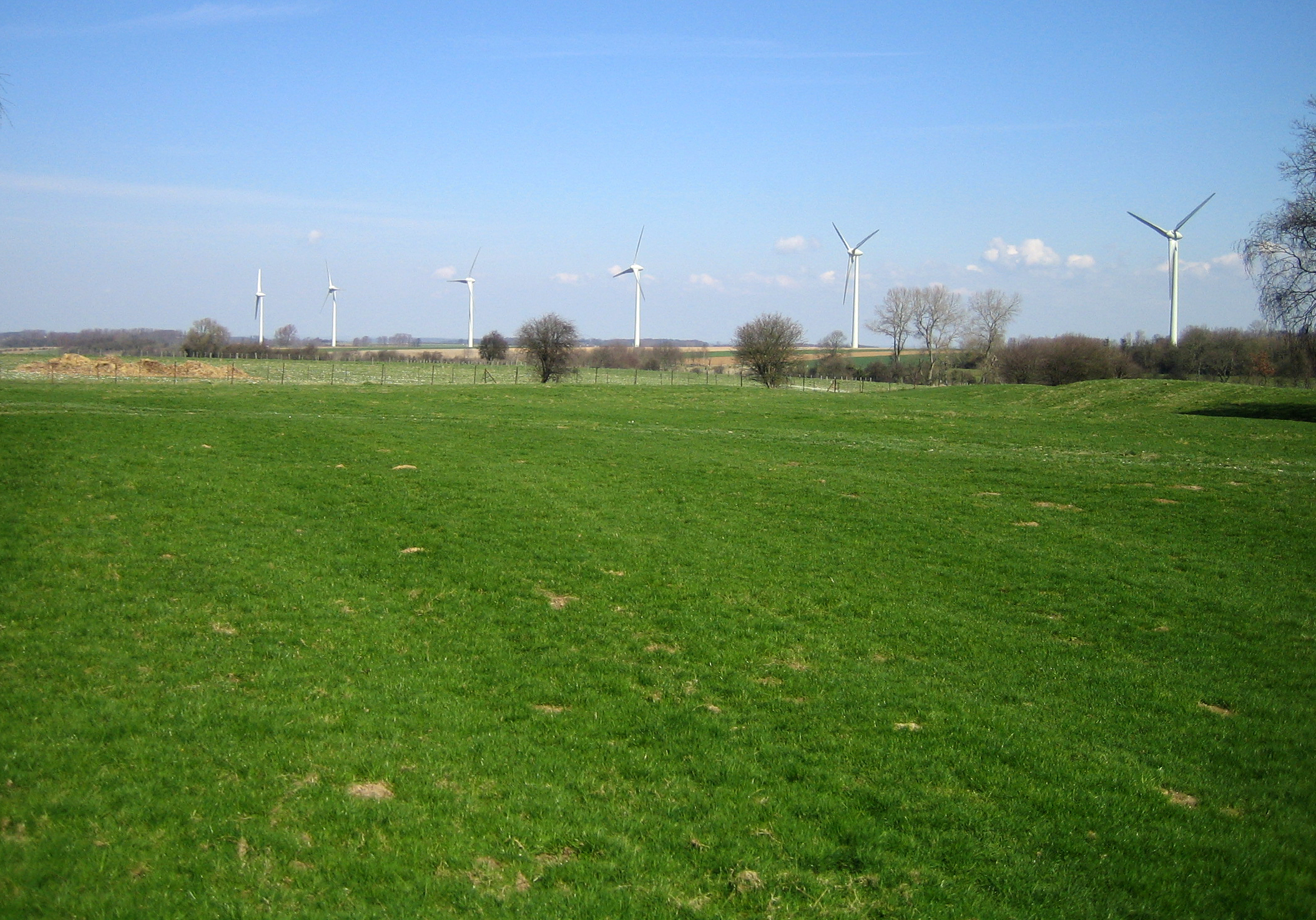 Fressenneville (Somme, France) La photo est prise en direction du Nord. La motte castrale est à droite. Attention ! Les données ci-dessous concernant la géolocalisation sont à corriger !